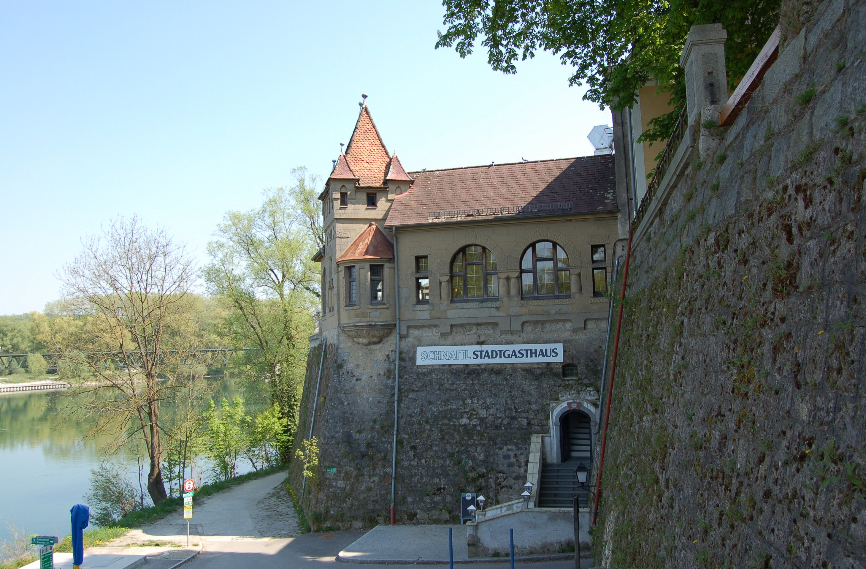 Die Stadtmauer in der Theatergasse 1-3 in Braunau am Inn (Oberösterreich).